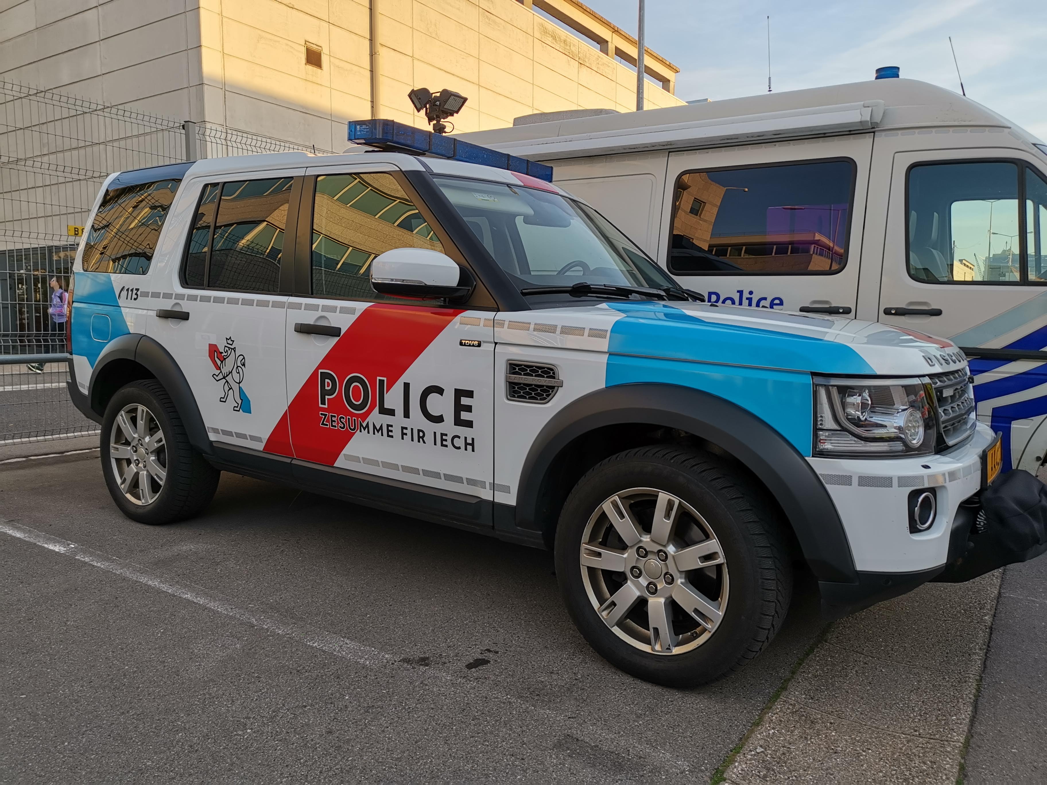 Luxembourg. Voiture de police Land Rover Discovery.